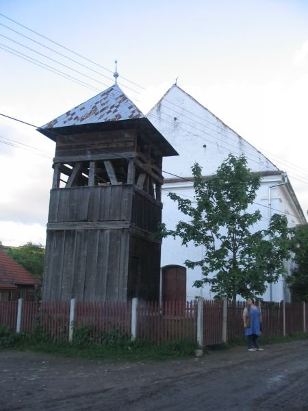 Ikafalvi református templom, 2006